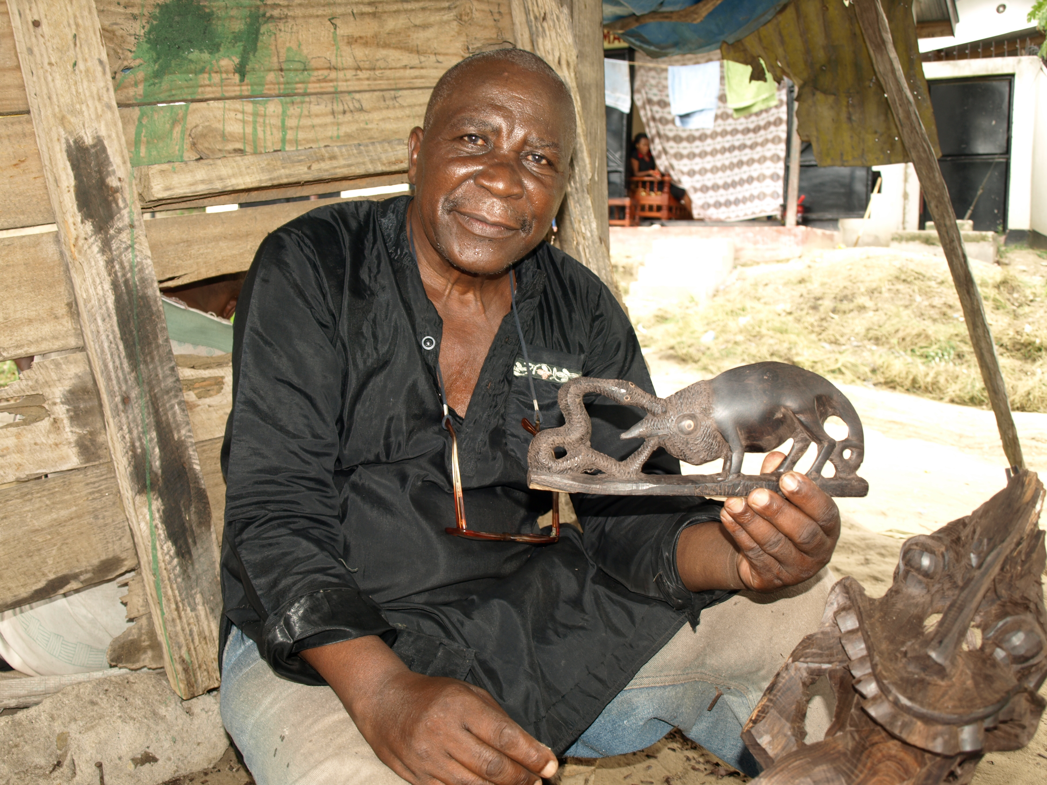 Foto effettuate in Tanzania nel 2007 insieme allo scultore tanzano Kashimiri Matajo